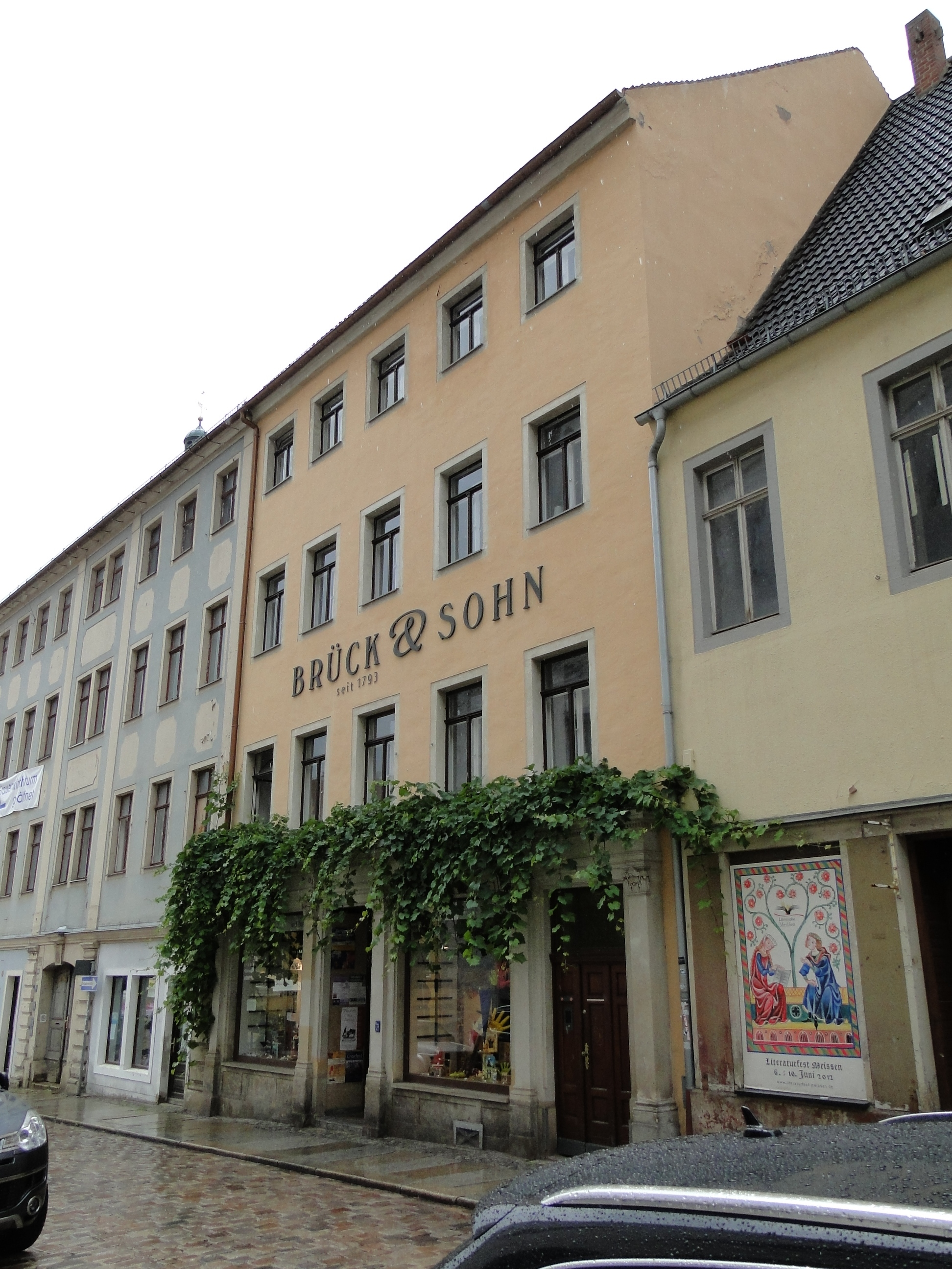 Burgstraße 1 Meißen, seit 1822 Sitz des Verlages Brück & Sohn